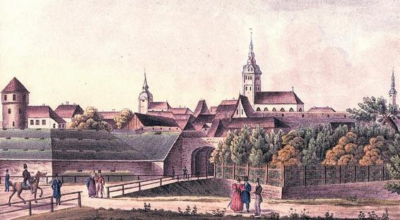 Tallinna linnamüüri Harju värav Joseph Steingrübeli litograafial, 1835.